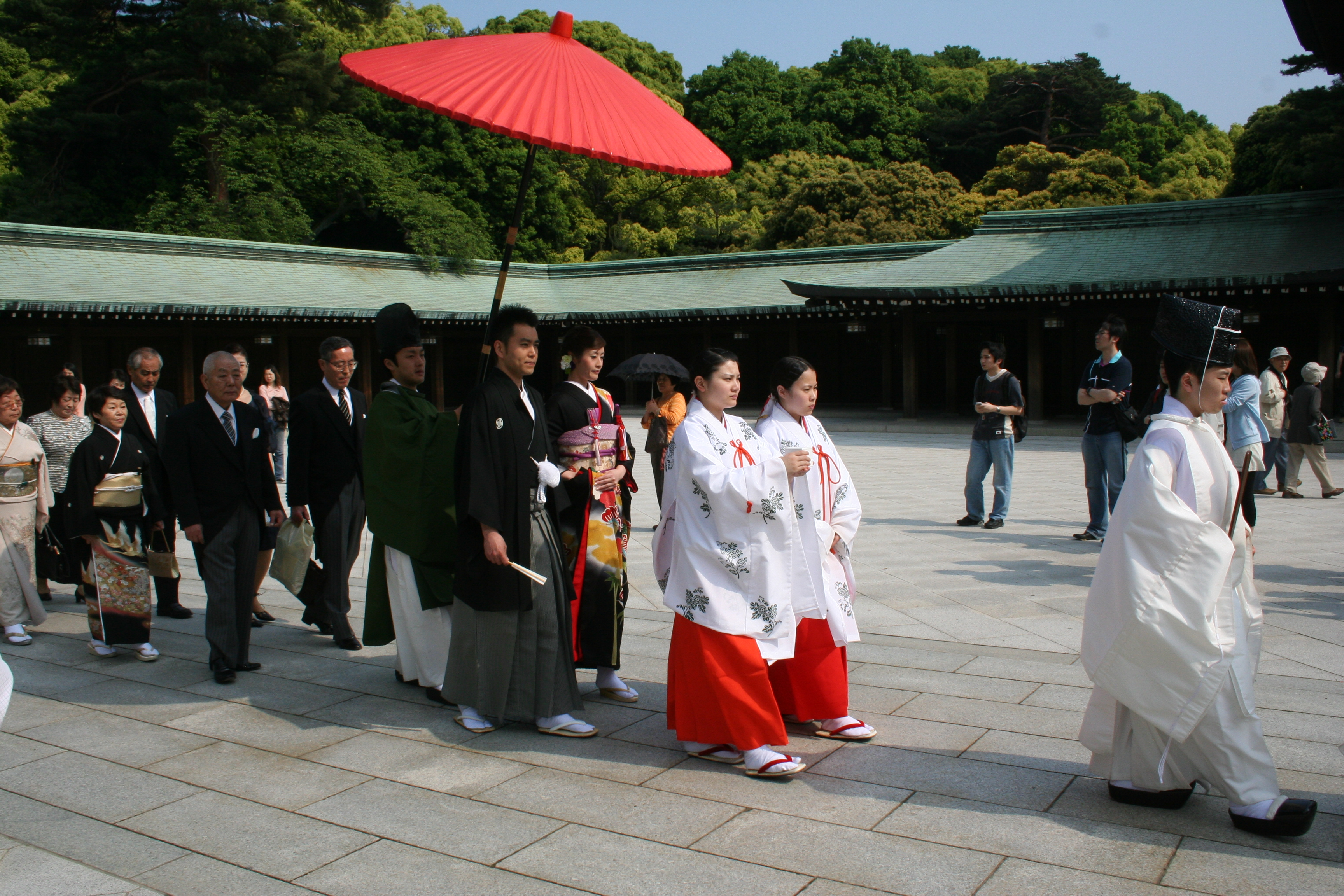 Wedding, Yoyogi Park